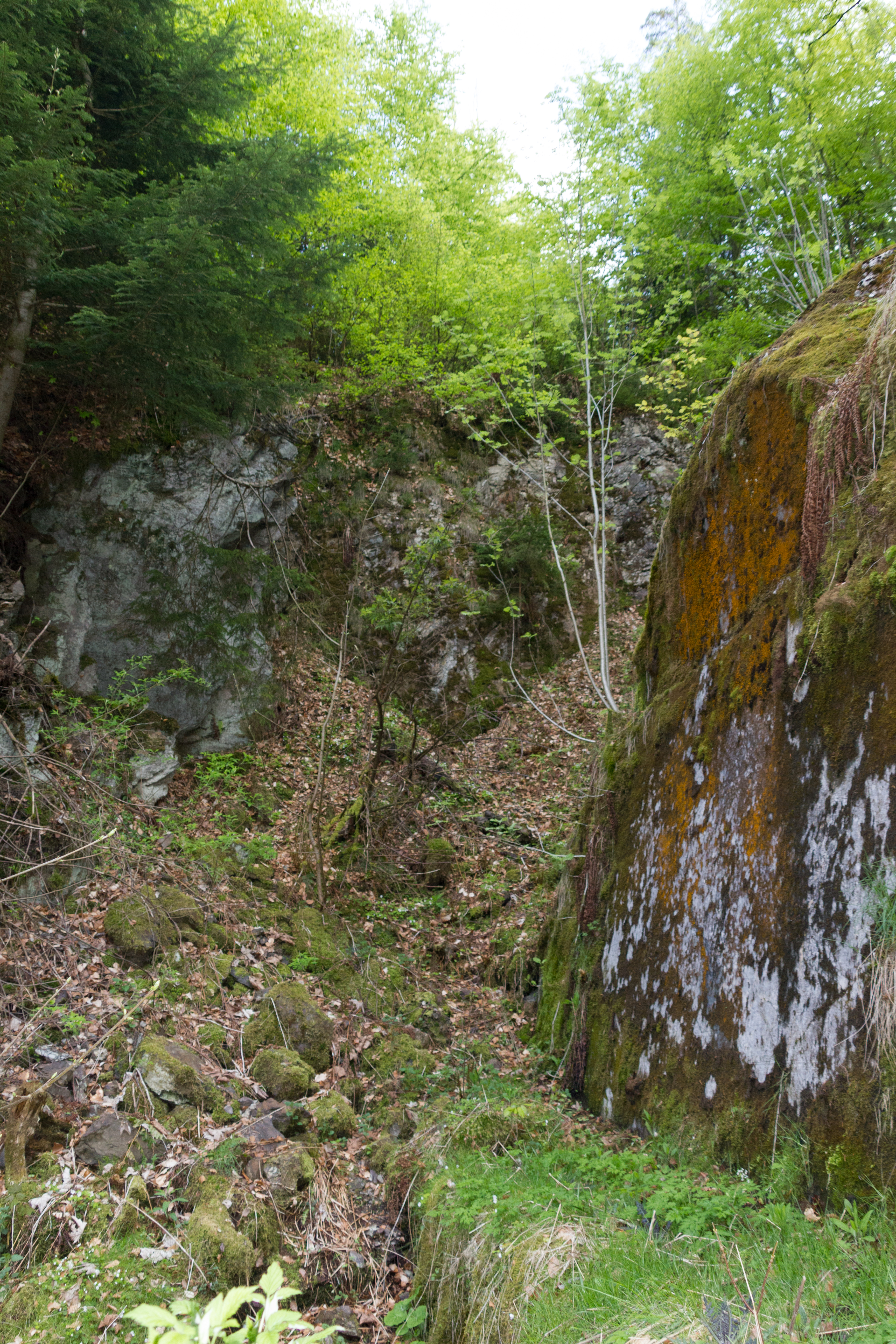 Aufgelassene Kalksteinbrüche am Rauheberg südlich von Langenau bei Geroldsgrün Geotop 475A010